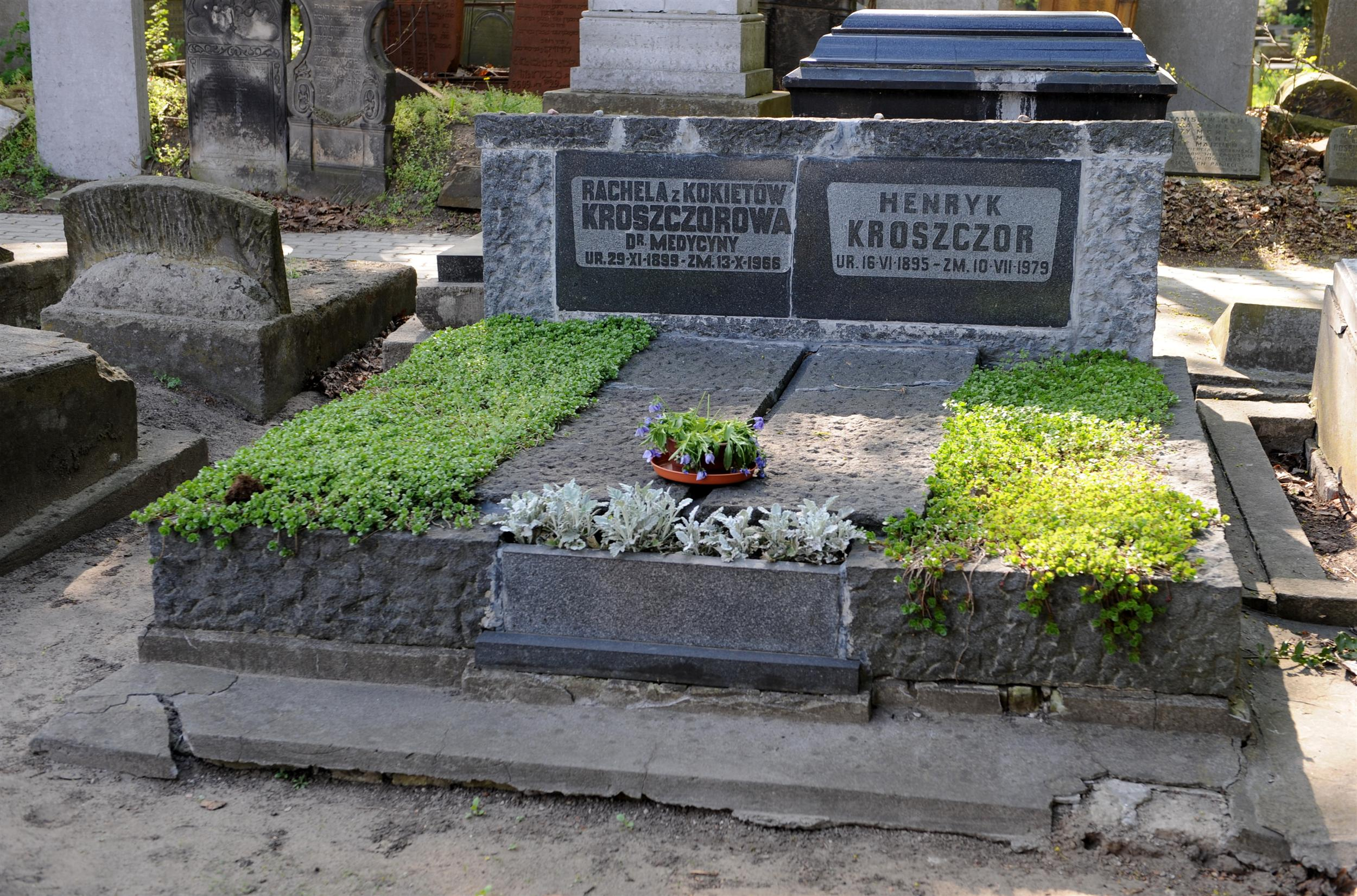 Grób Henryka Kroszczora na Cmentarzu Żydowskim w Warszawie